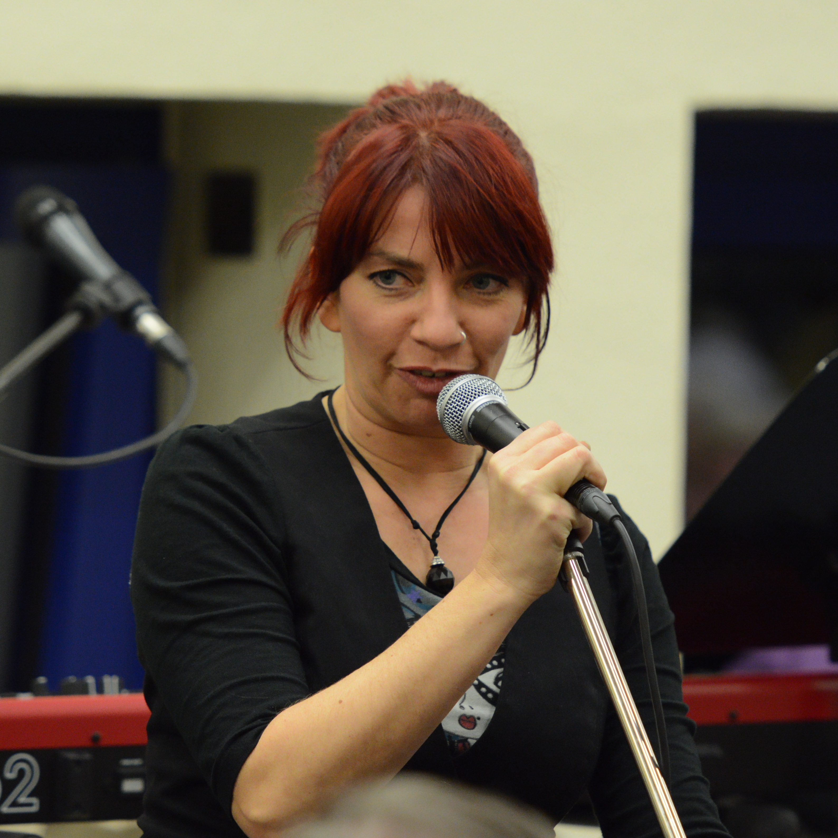 Dagmar Schönleber bei einem Auftritt in der Bezirksbibliothek Buchholz in Duisburg.